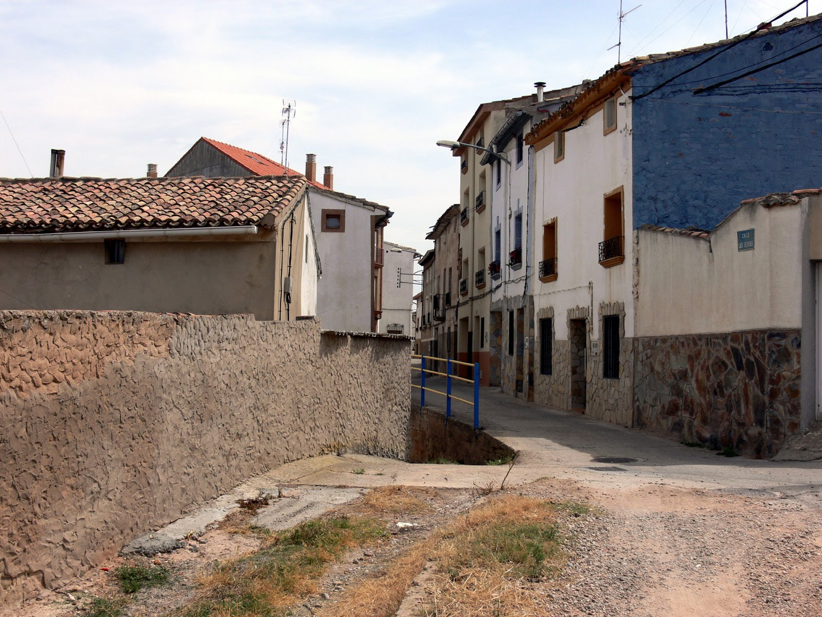 El Villar de Arnedo, La Rioja (España)